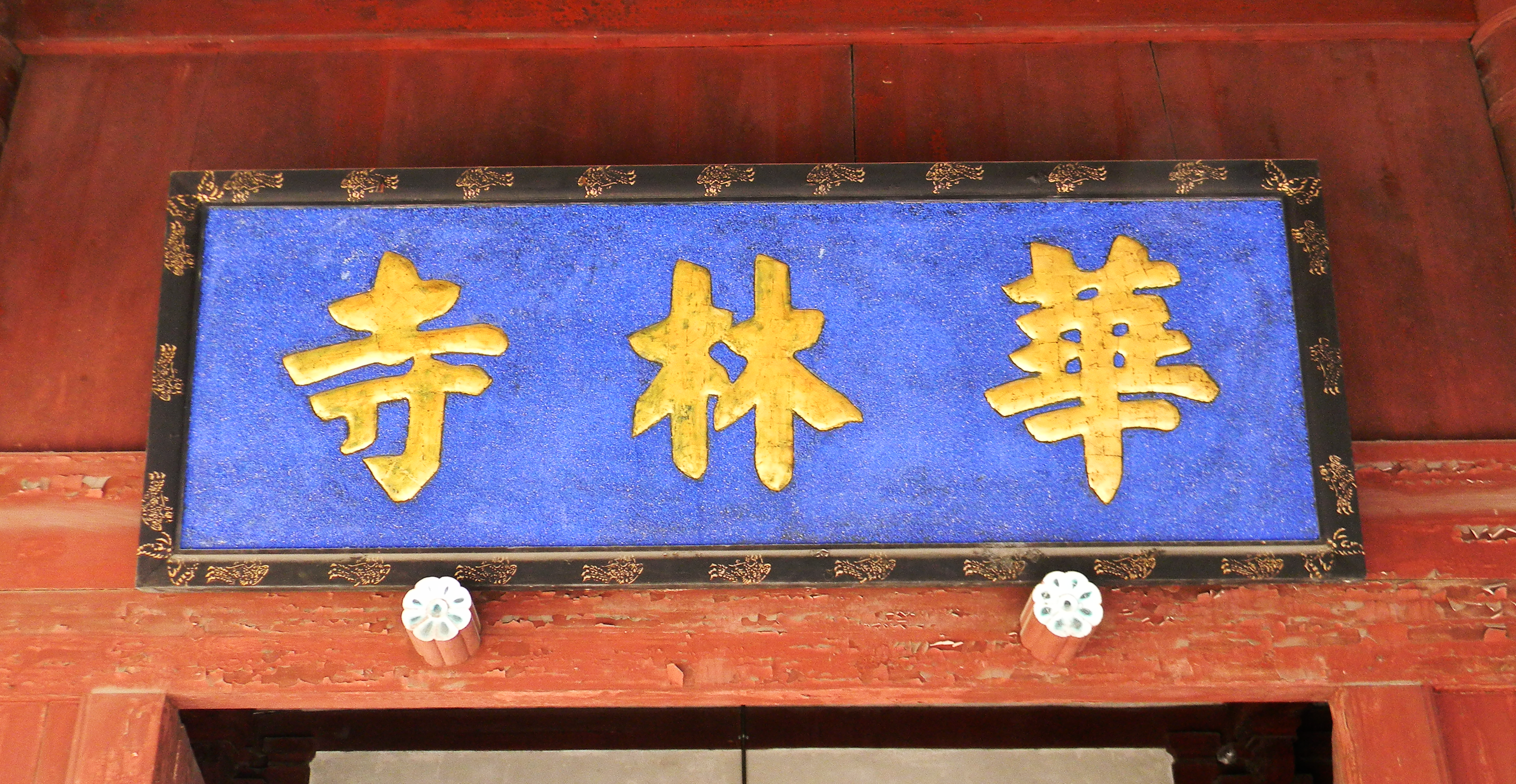 福州华林寺的明代正统九年（1444年）御赐牌匾